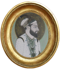 Nasir jung, Nizam of Hyderabad